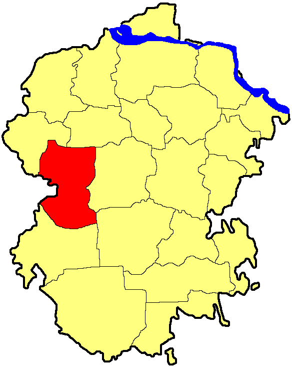 Шумерлинський район Чувашії